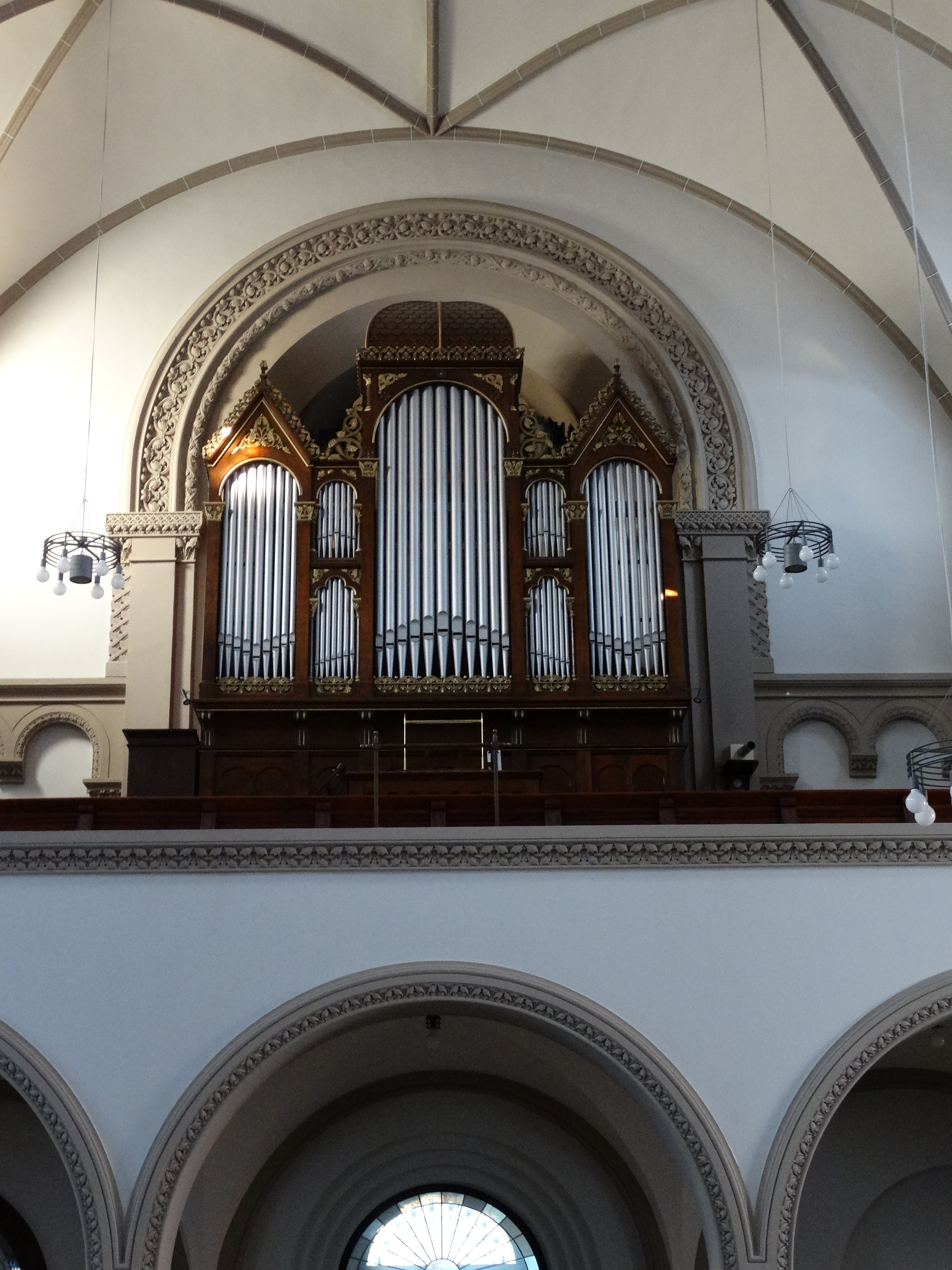 Orgel der Herz-Jesu-Kirche in Plauen